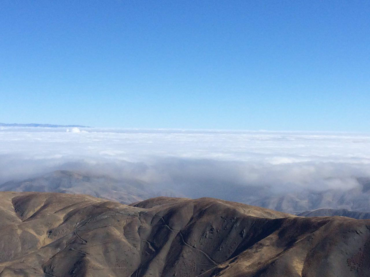 یک روز ابری از بالای قله چمن